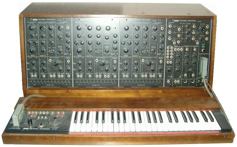 Photo